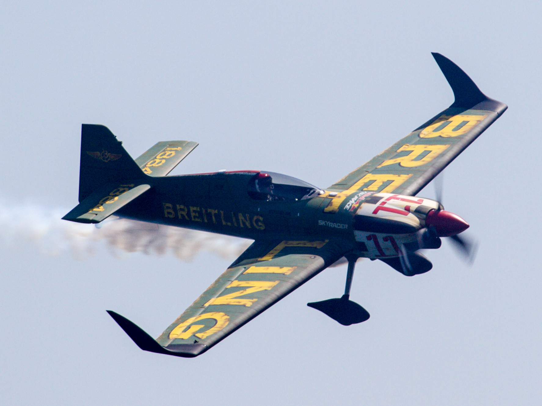 2017年レッドブル・エアレース・ワールドシリーズ 千葉 ミカエル・ブラジョー(フランス)の機体